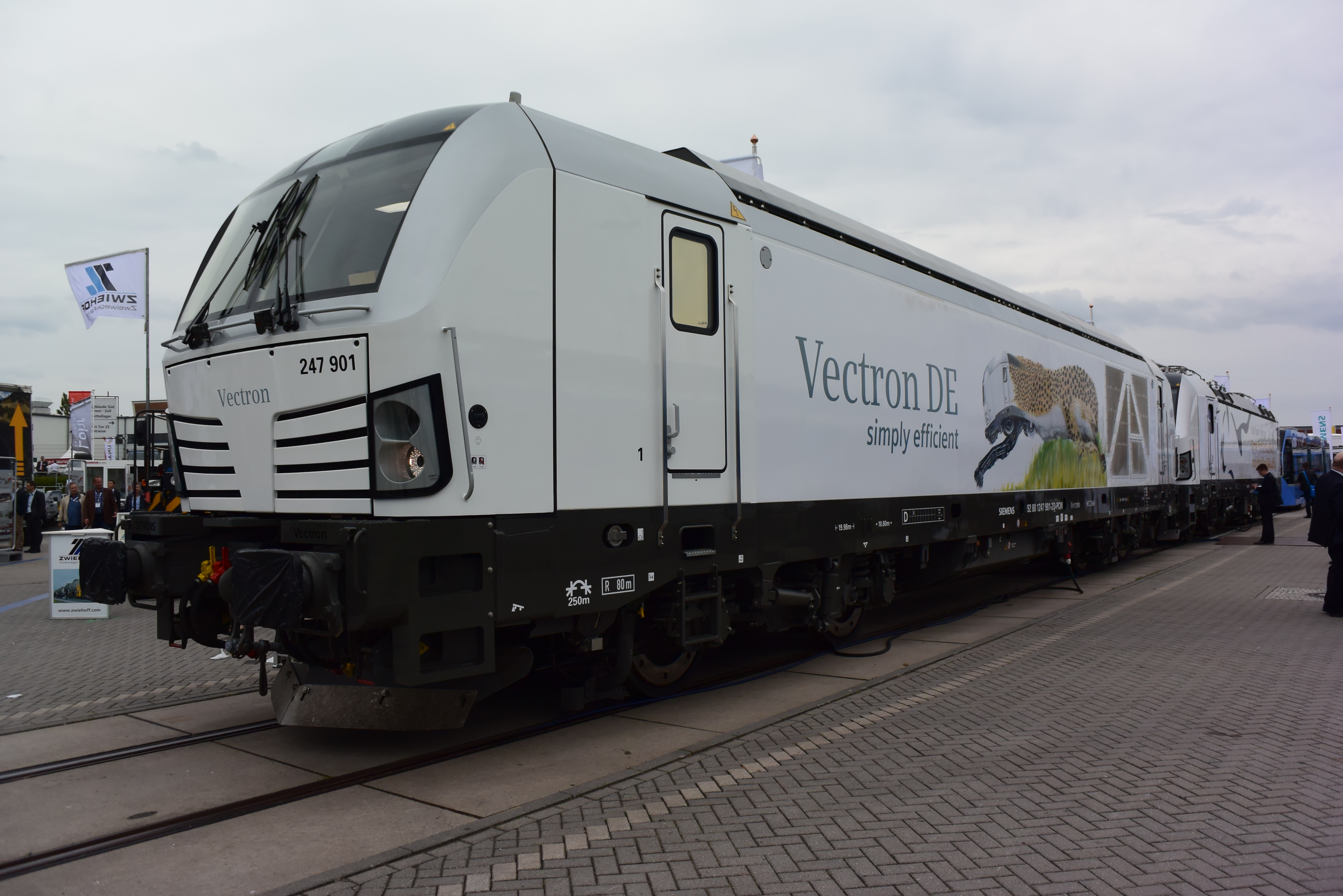 Siemens Vectron podczas InnoTrans 2014